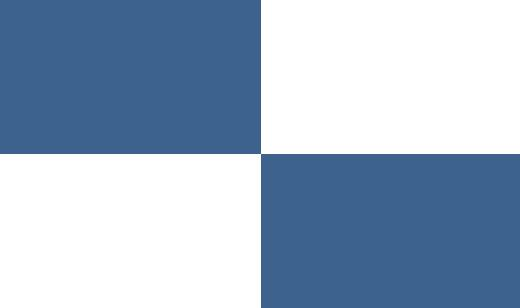 Bandera de Portonovo, Pontevedra.